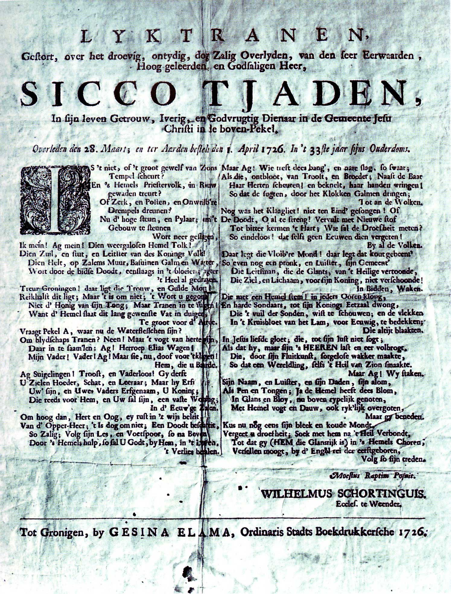 Lijdicht op het overlijden van dominee Sicco Tjaden (1693-1726) door Wilhelmus Schortinghuis (1700-1750)